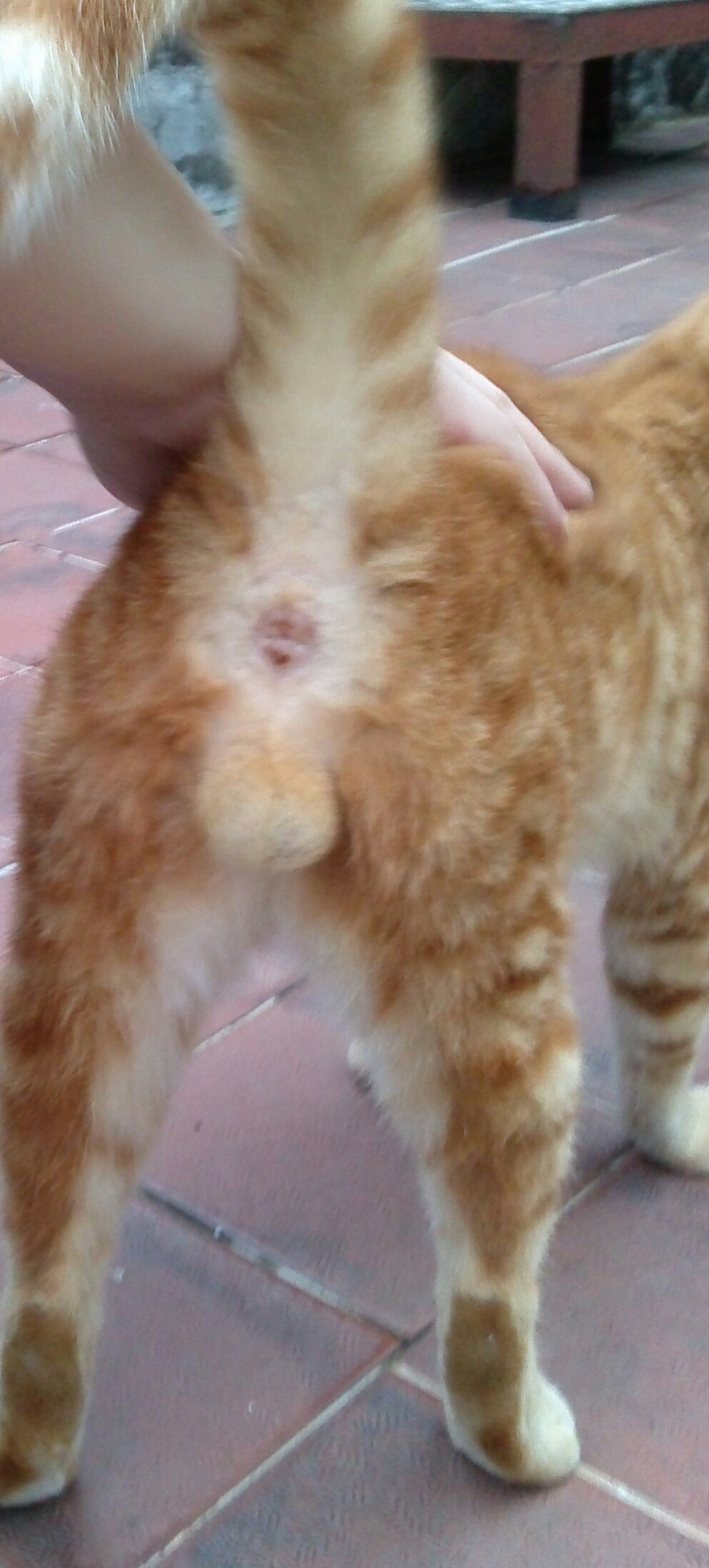 貓的肛門